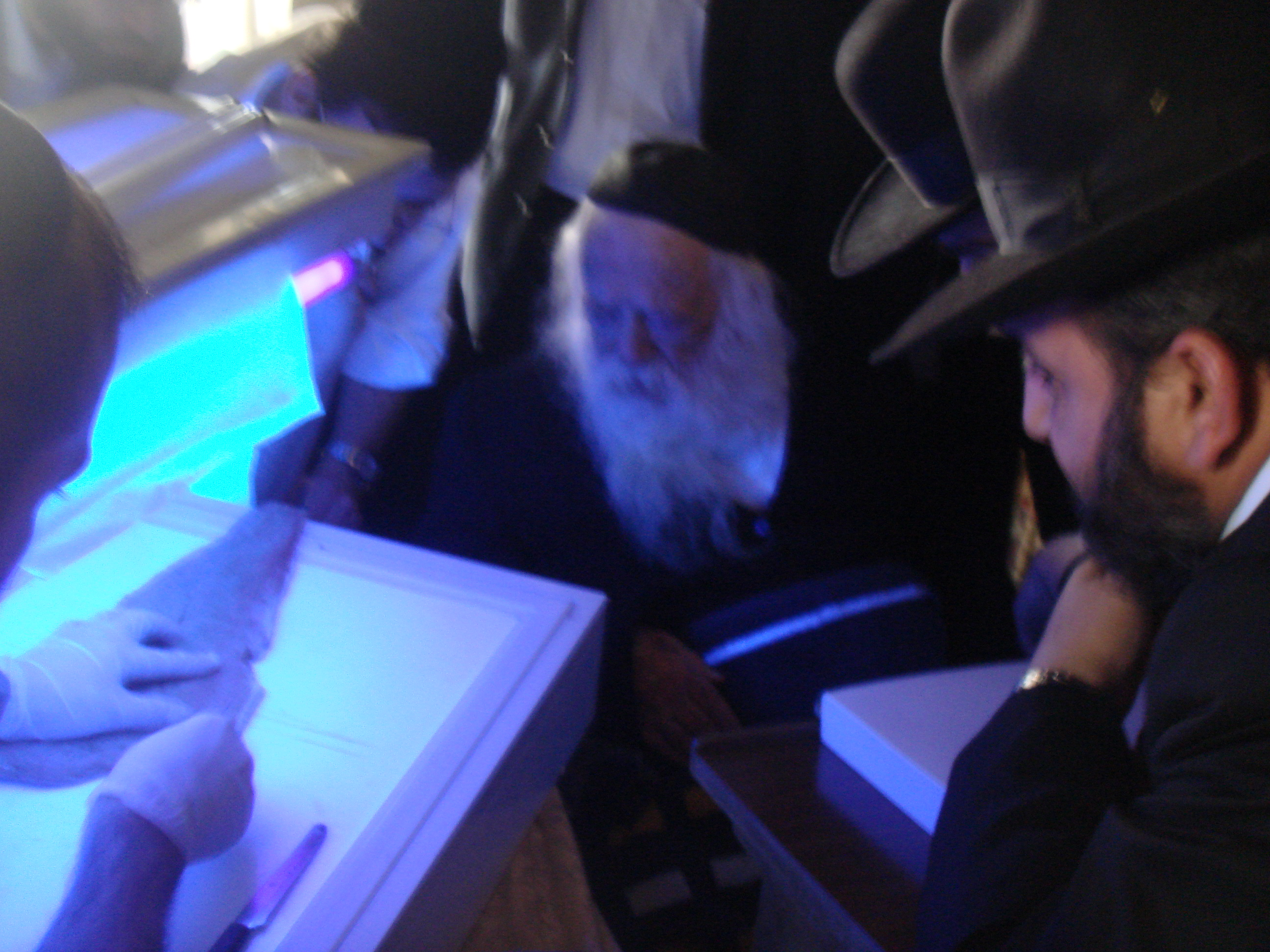 הגאון רבי חיים קנייבסקי מבחין בתולעים בבשר דג הסלמון תחת תאורת UV